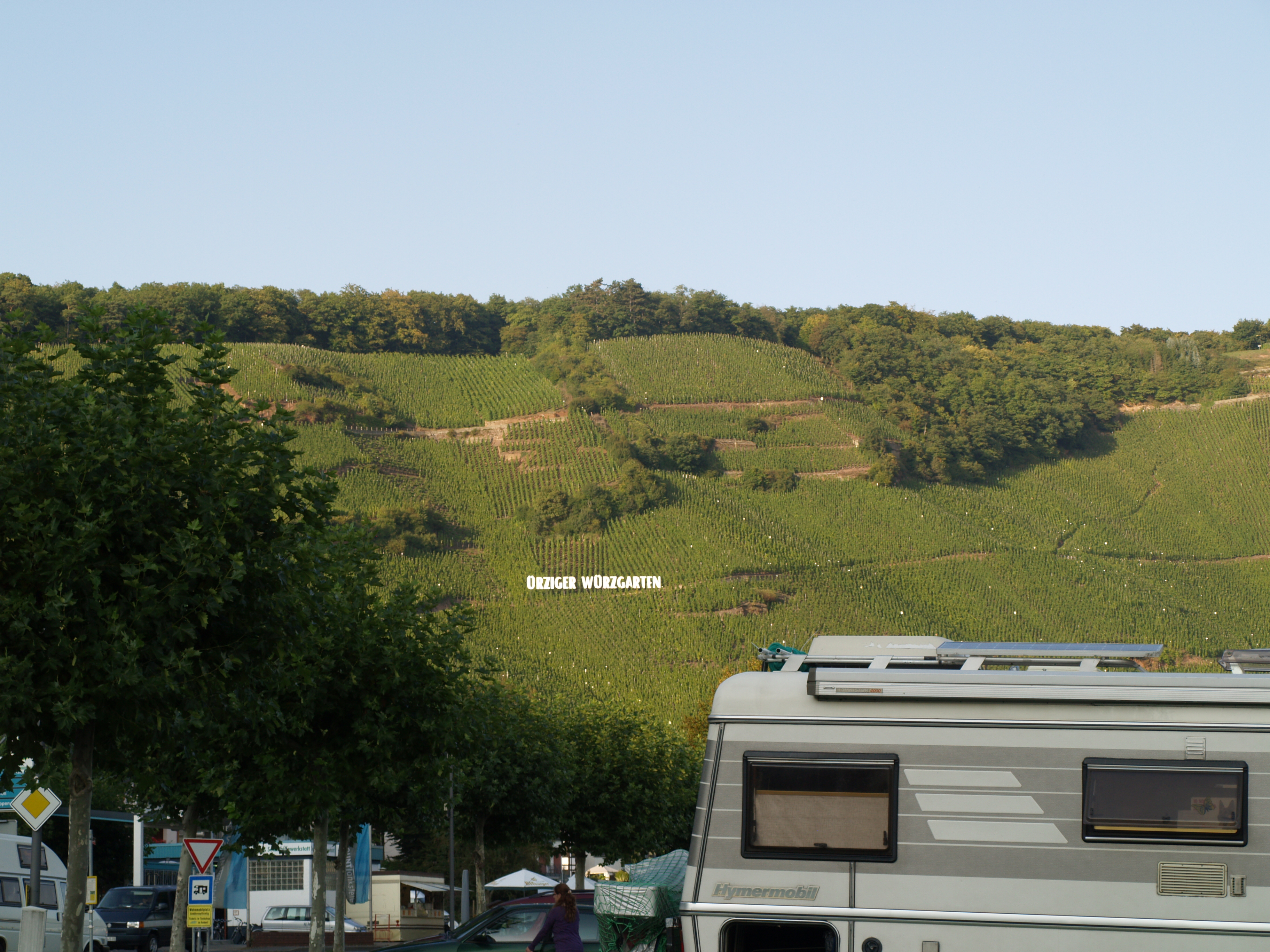 Ürtziger Würtzgarten - üks Moseli kuulsaimaid veinipiirkondasid.